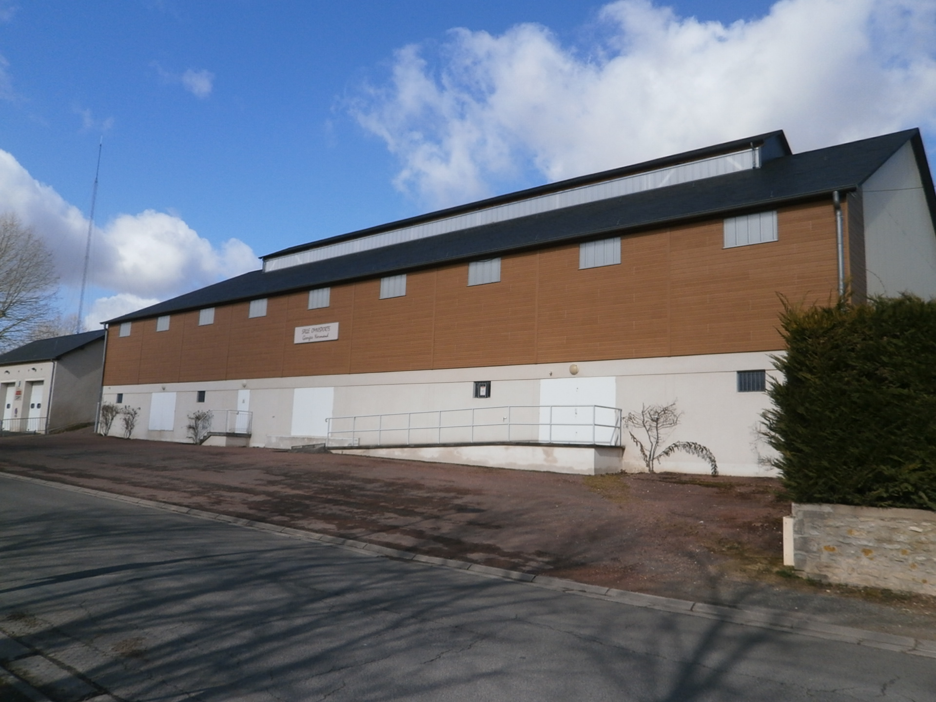 La salle des sports Georges Normand